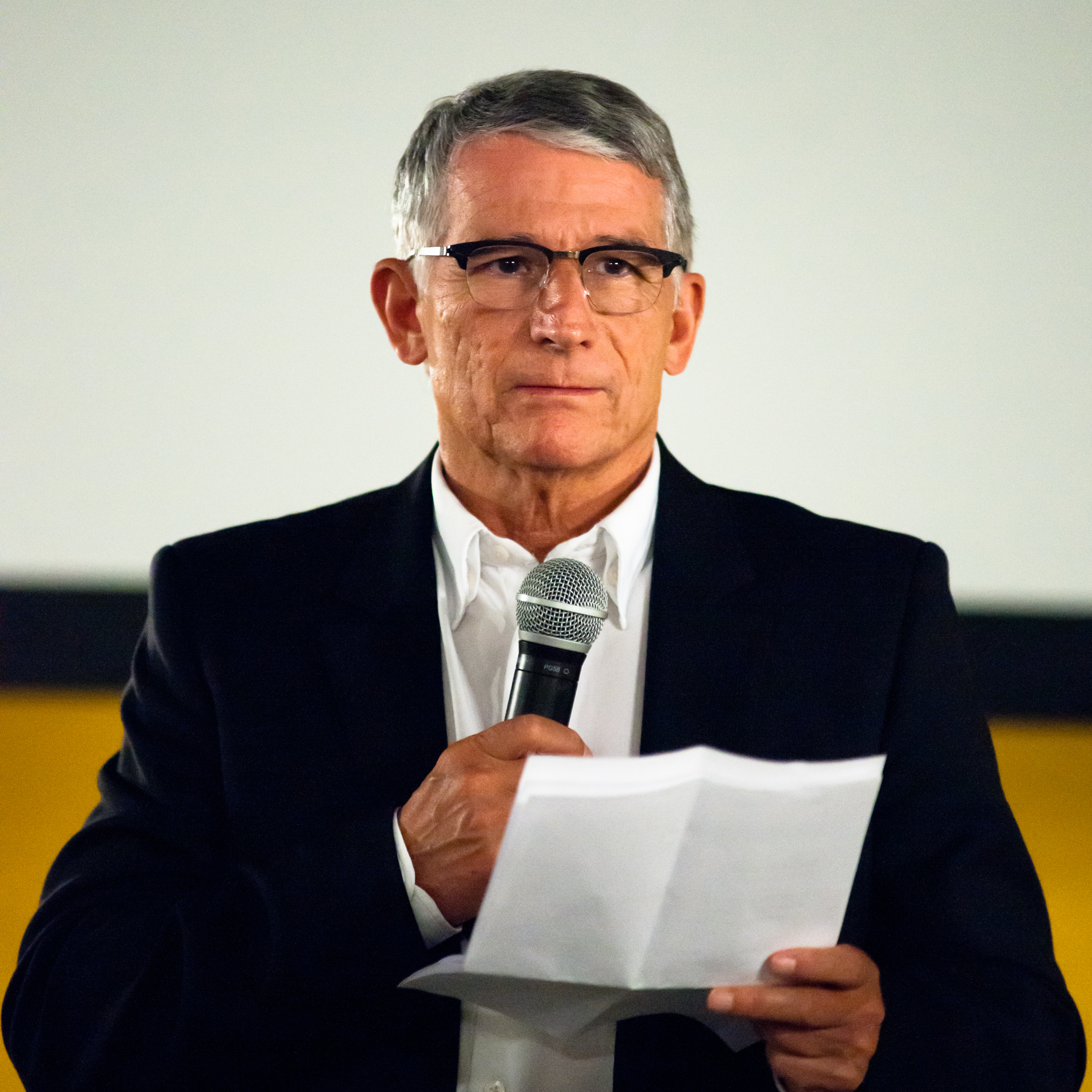 Toulouse (Haute-Garonne, France) : Pierre Cohen, maire de Toulouse lors de la Novela 2010.